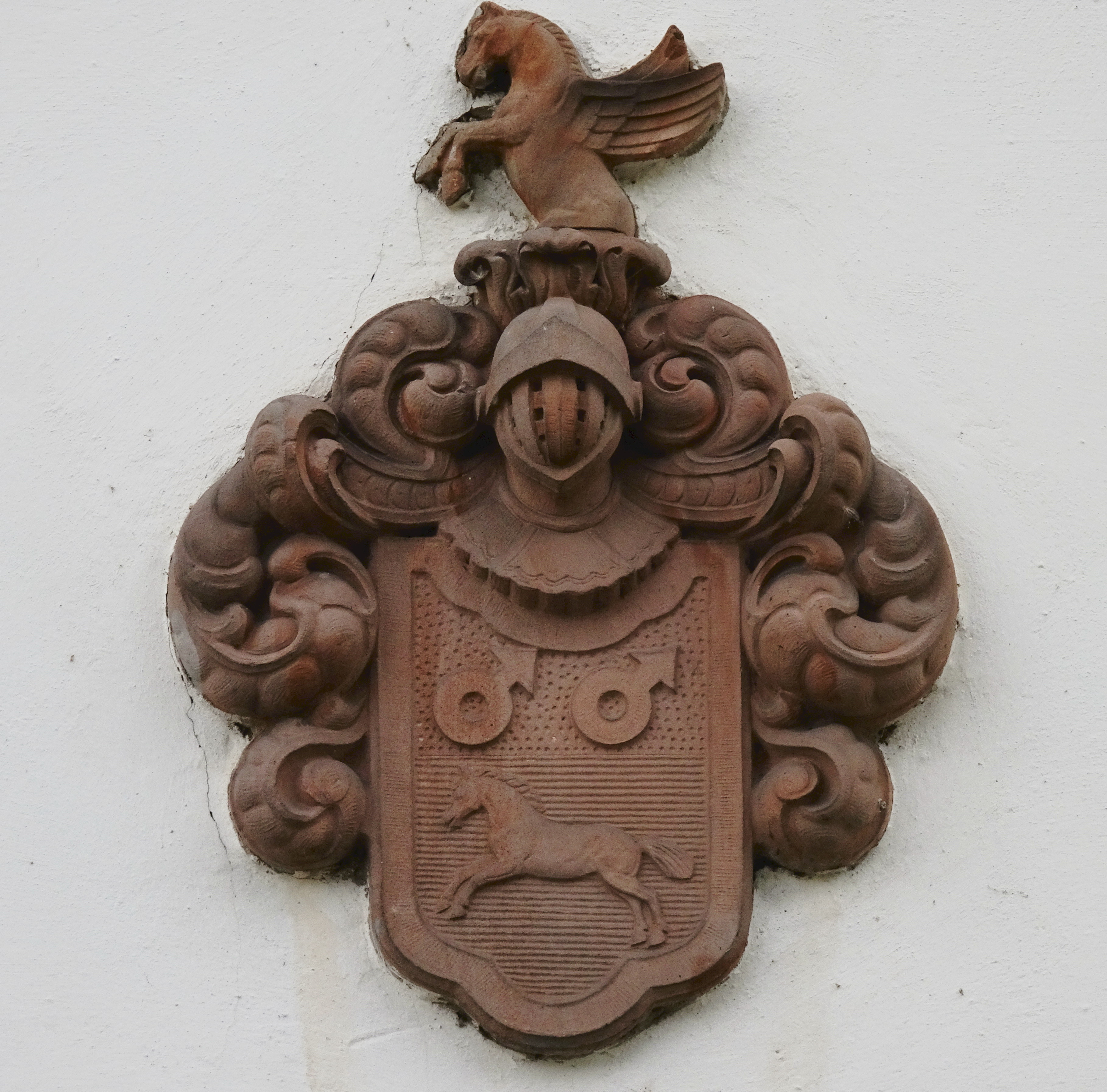 Tamms adelsvapen över dörren till Tamms herrgård